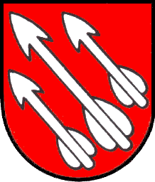 Wappen der politischen Gemeinde Wintersingen, Schweiz